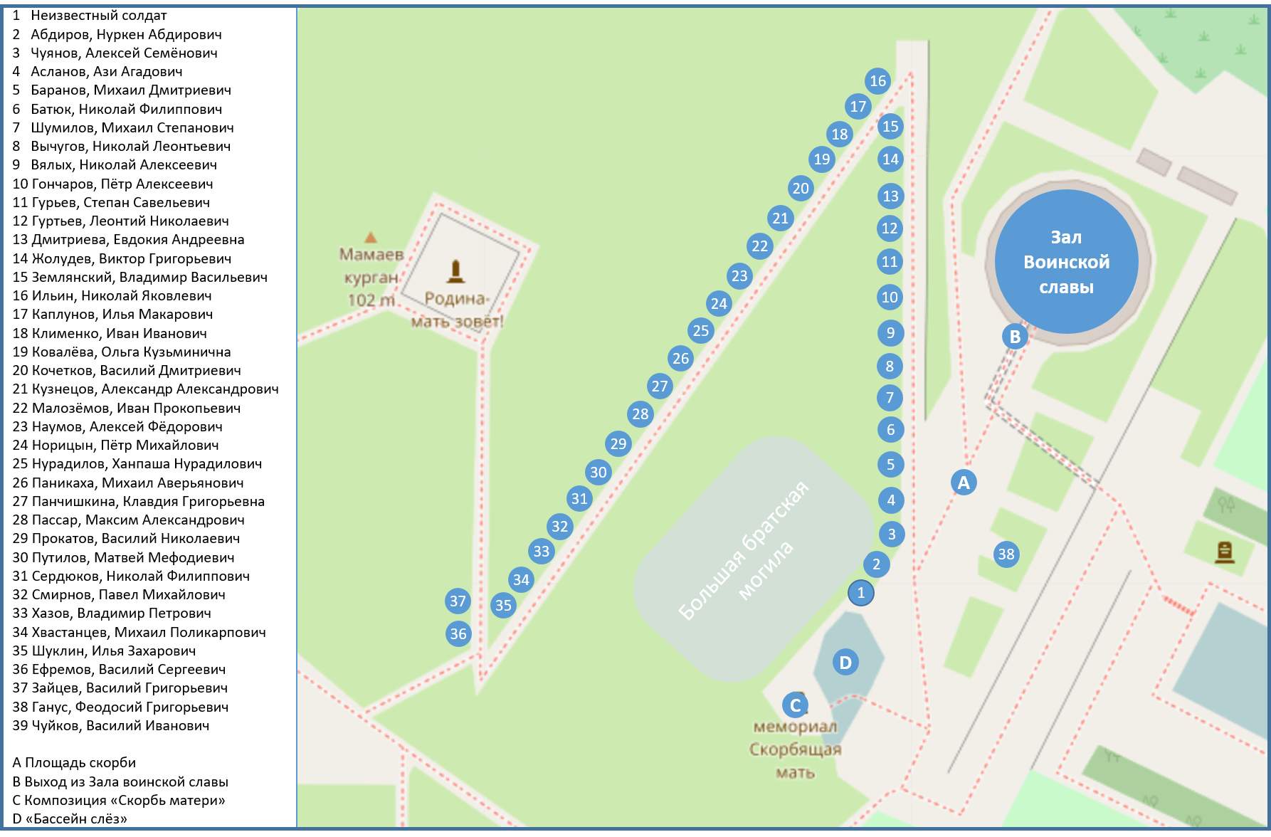 Схема Большой братской могилы мемориального комплекса "Героям Сталинградской битвы" (Мамаев курган) Волгоград Россия. This map may be incomplete, and may contain errors. Don't rely solely on it for navigation.